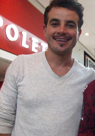 Anderson di Rizzi ator da rede globo.